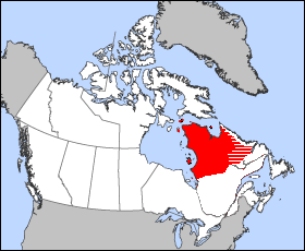 Territoire approximatif du district de l'Ungava des Territoires du Nord-Ouest, Canada, de 1898 à 1912. La frontière orientale n'est fixée qu'en 1927. Modification de "